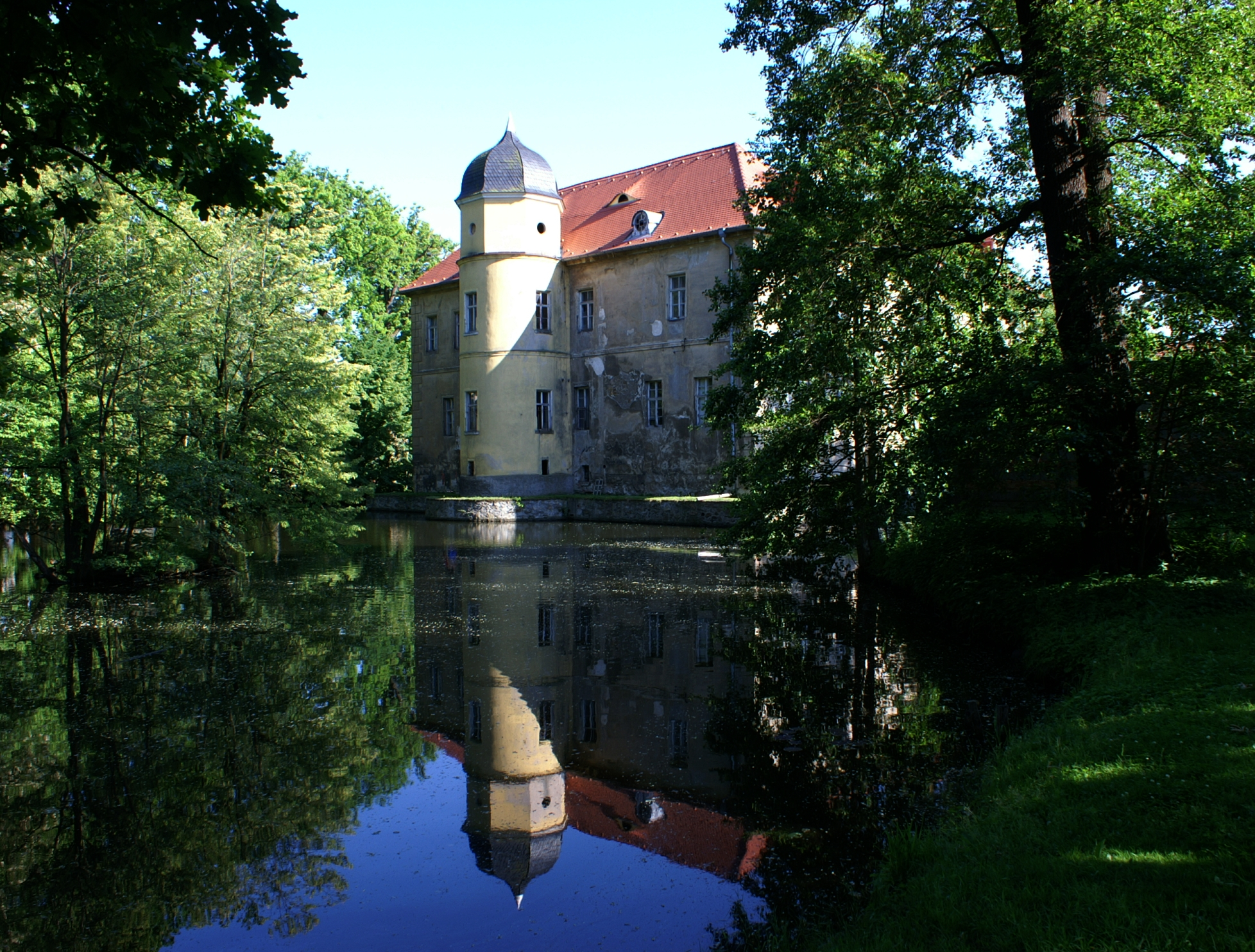 Wasserschloss in Berbisdorf